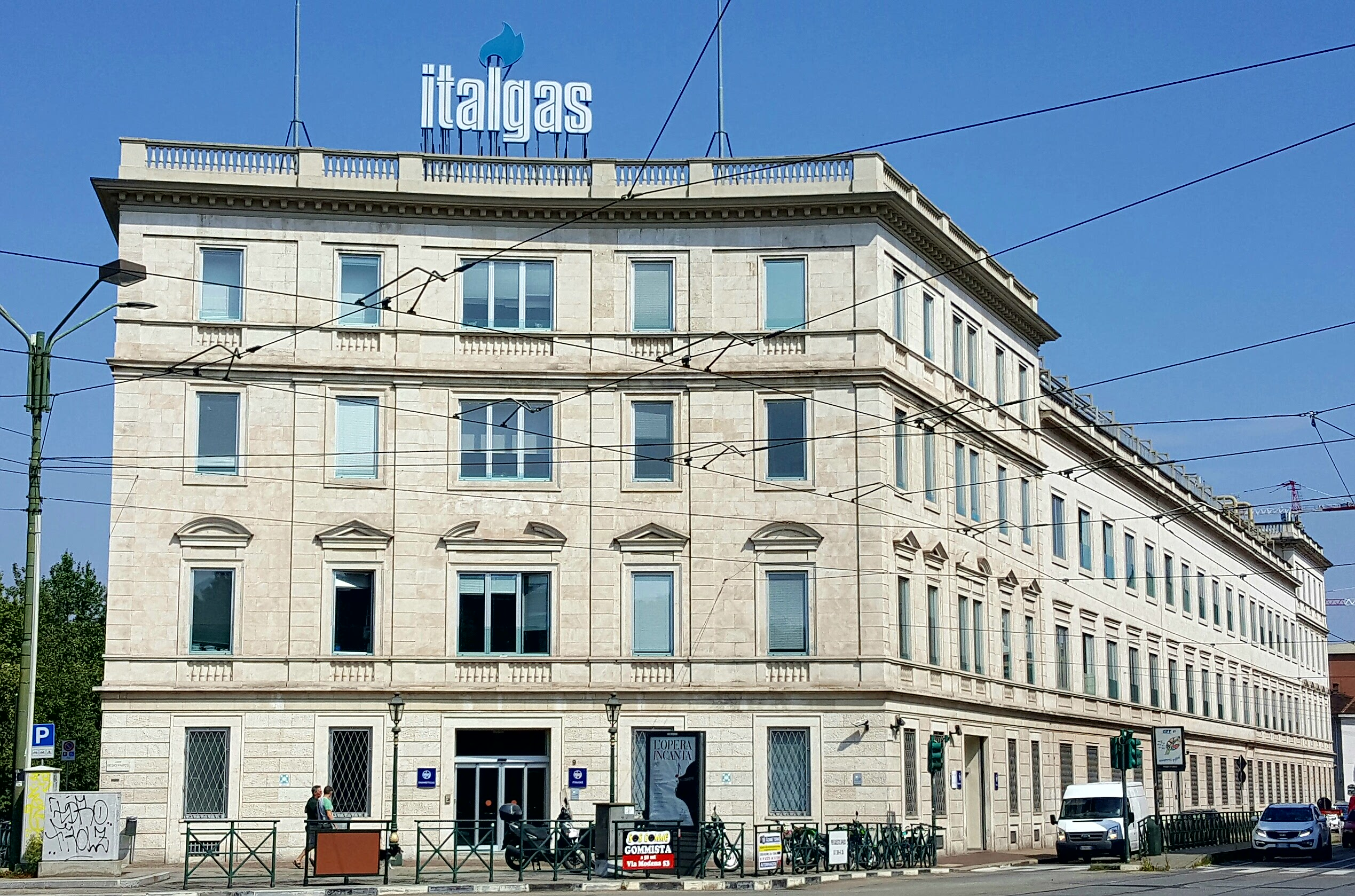 Sede di Italgas a Torino